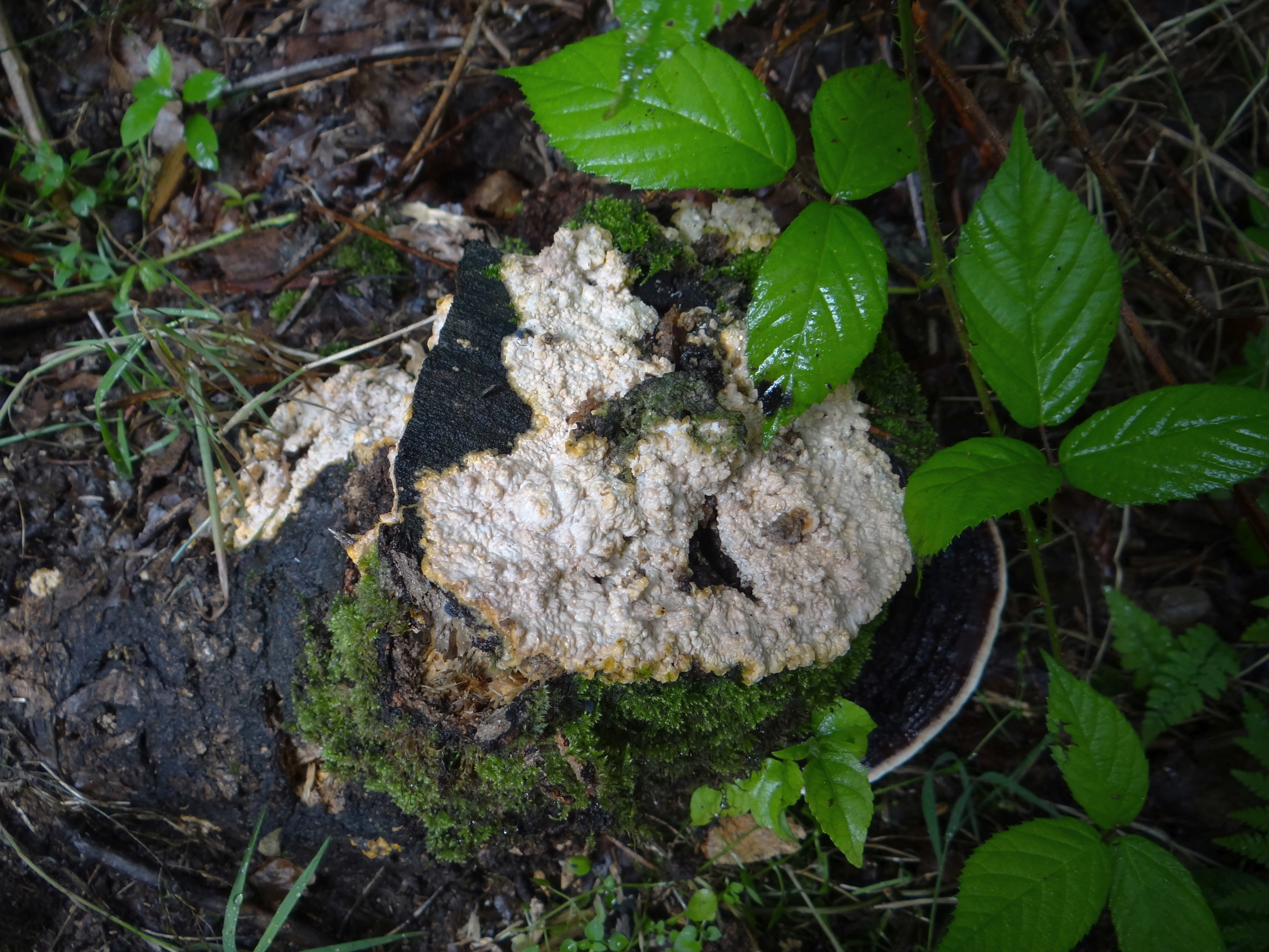 Phlebiopsis gigantea (location: Poland. Leszczyna, województwo małopolskie)